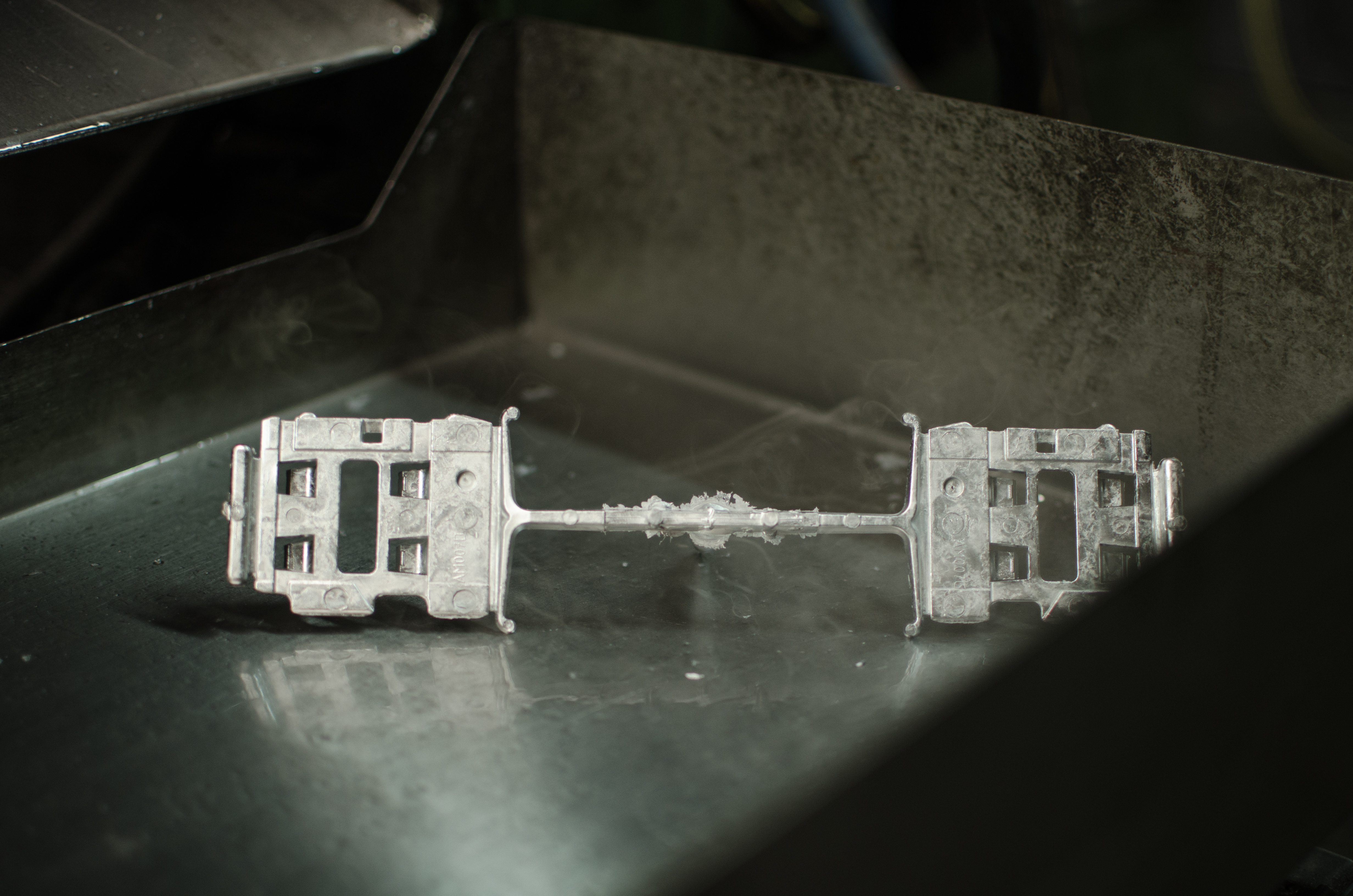 Pièce en Zamak avec son système d'alimentation